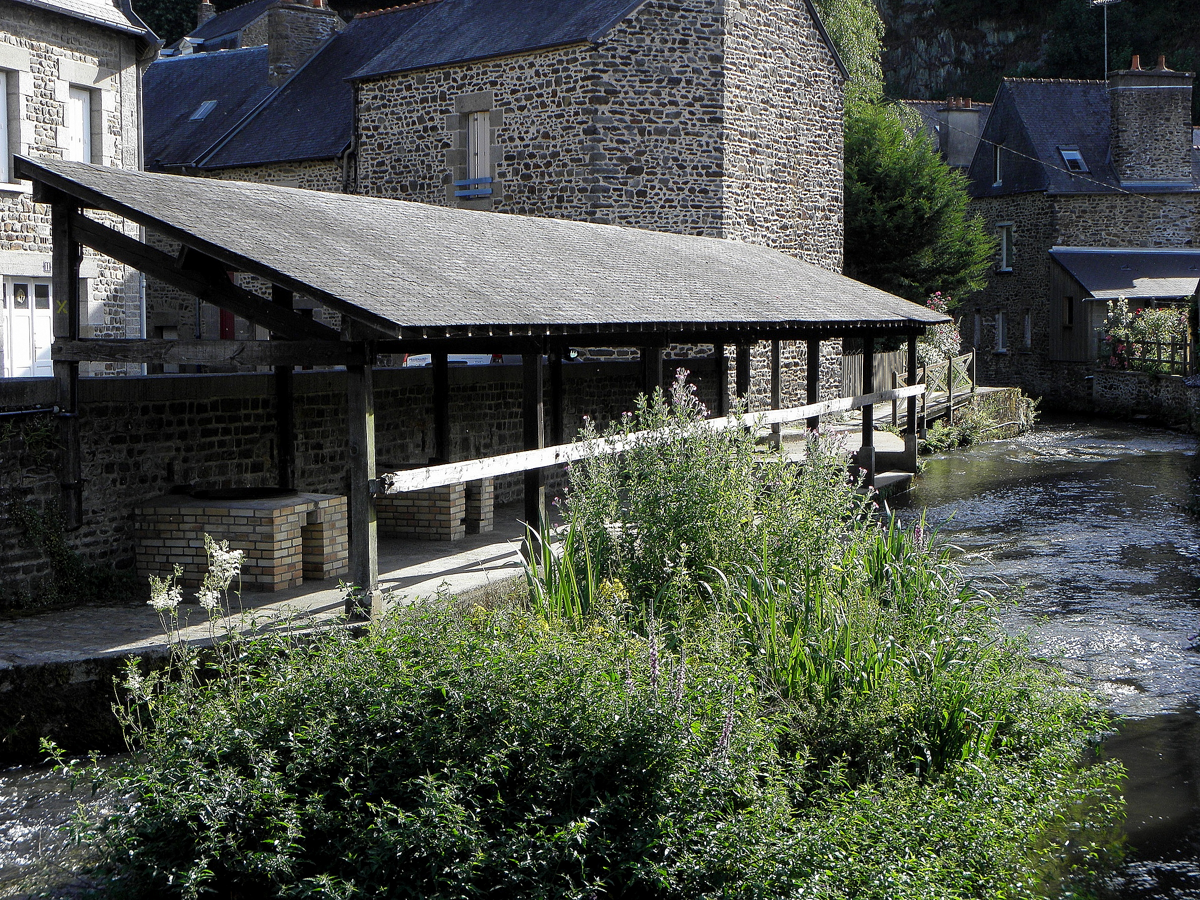 La rivière du Nançon à Fougères (35). Lavoir.